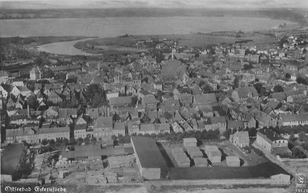 Eckernförde ca. 1930